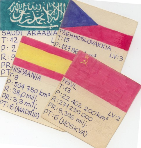 Mõned lipukaardid 1980-ndate lõpust